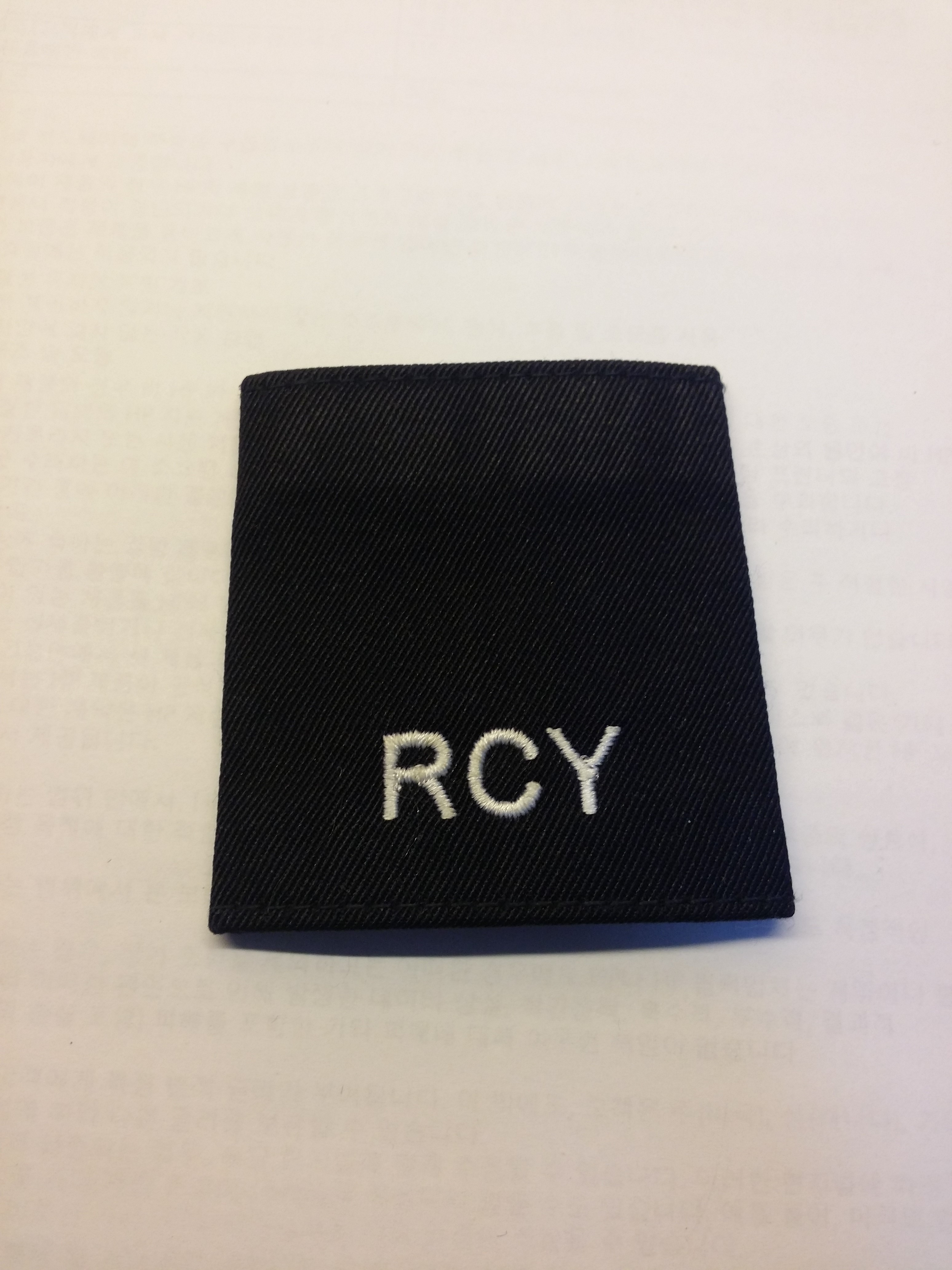 高級青年會員肩章